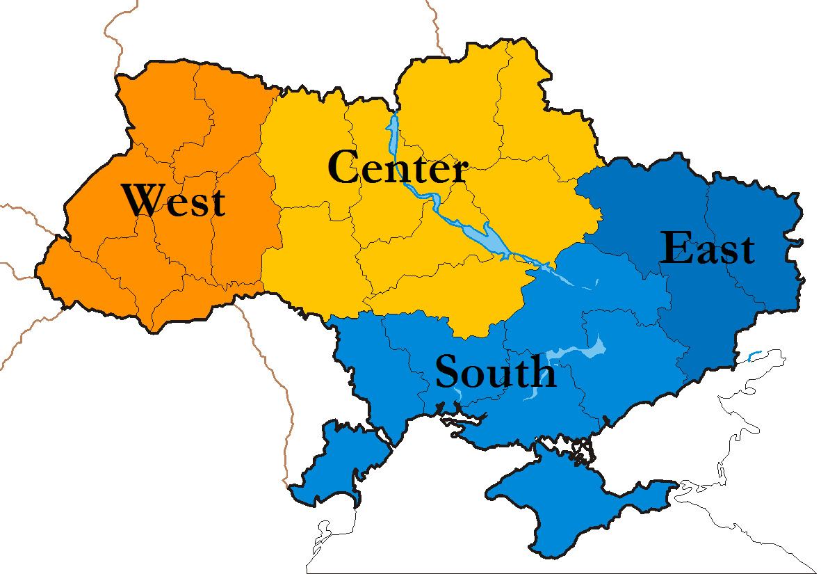 Zonas para estudio electoral